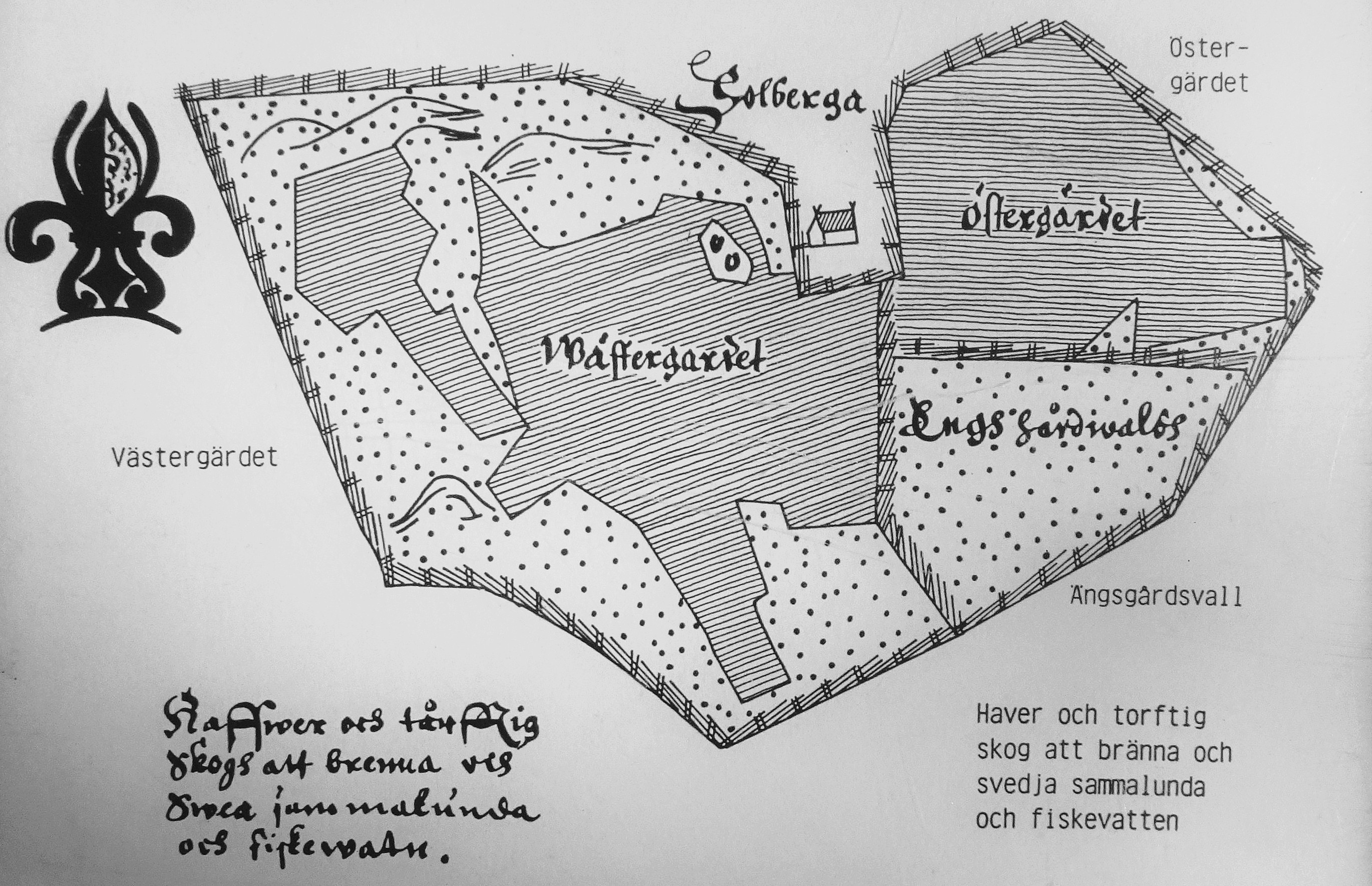 Karta över Solberga gård 1636